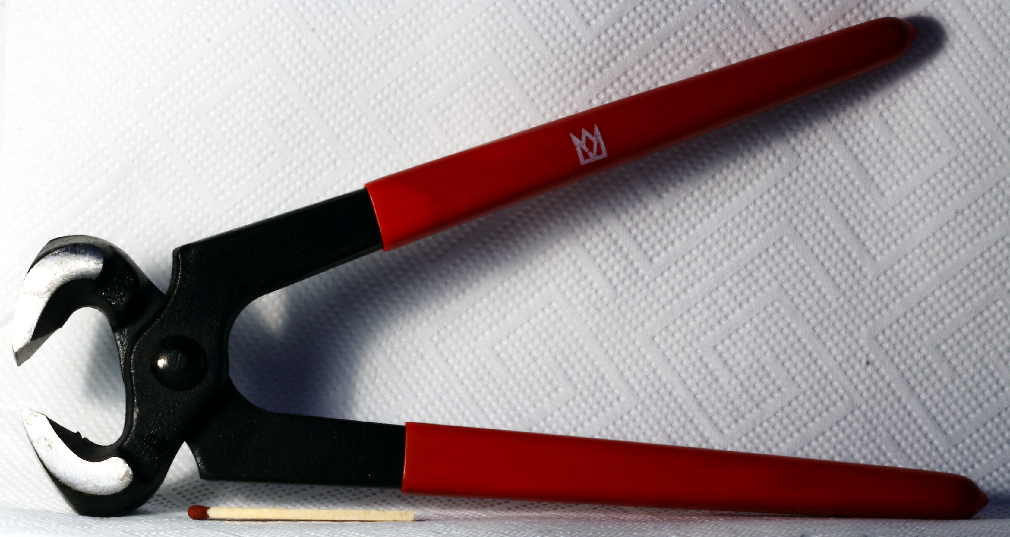 Kneifzange